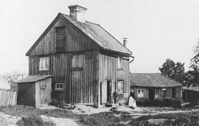 "Ensamma huset" på Skinnarviksberget. Här bodde Erik Asklund sina sista 14 år